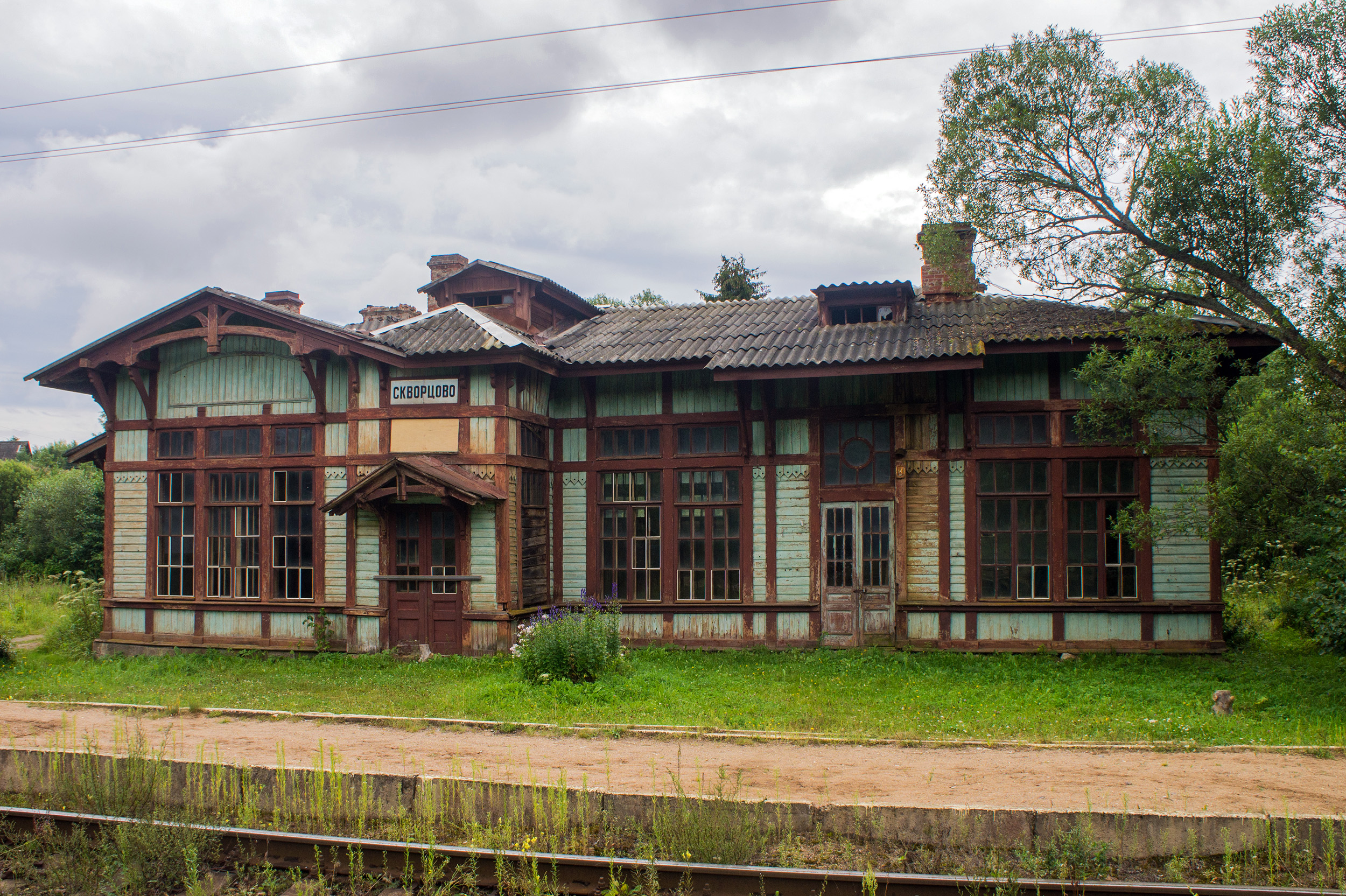 Вокзал о.п. (бывшей станции) Скворцово, нетронутый в годы ВОВ